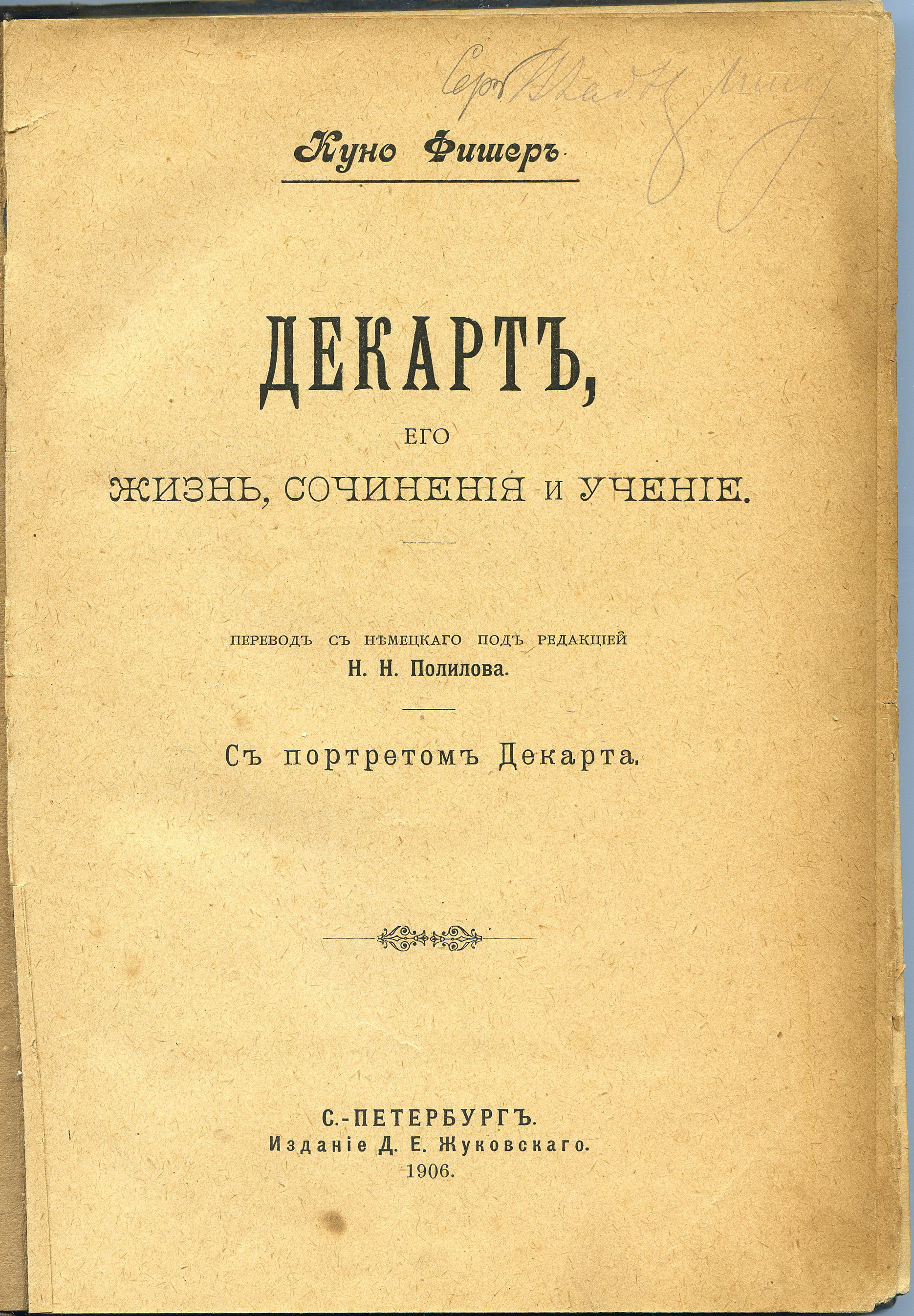 Титульный лист книги Куно Фишера "Декарт, его жизнь, сочинения и учение", изданной в Санкт-Петербурге Российской Империи в 1906 году.